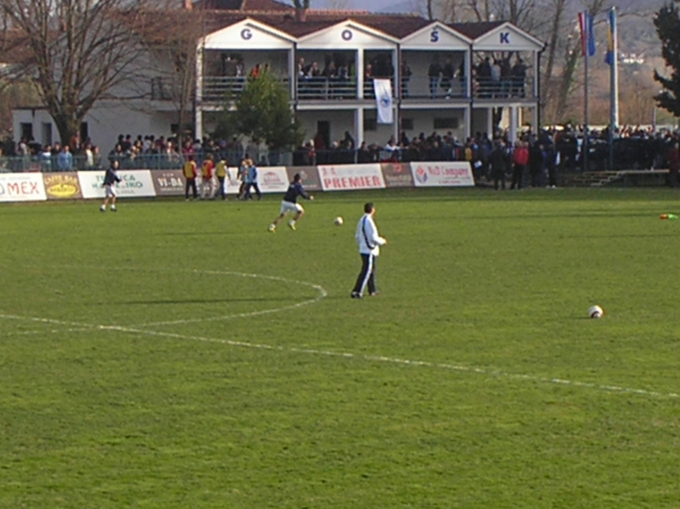 Stadion u Gabeli